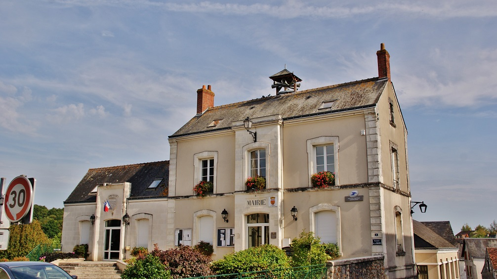 La Mairie